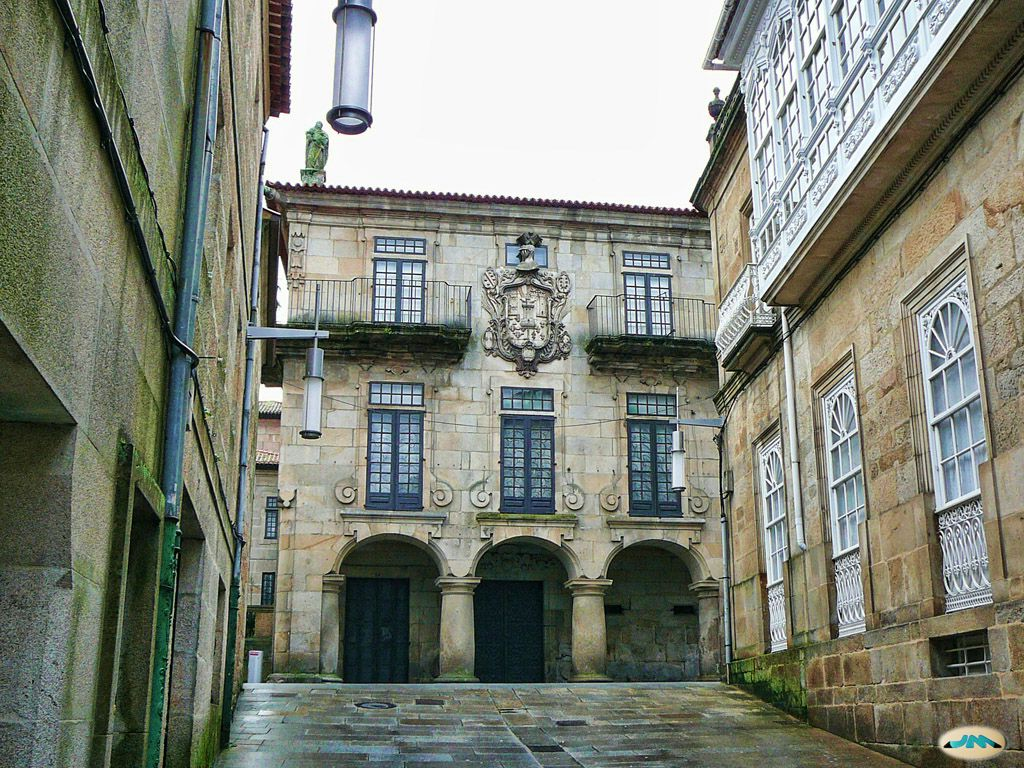 Pontevedra. Museo García Flórez